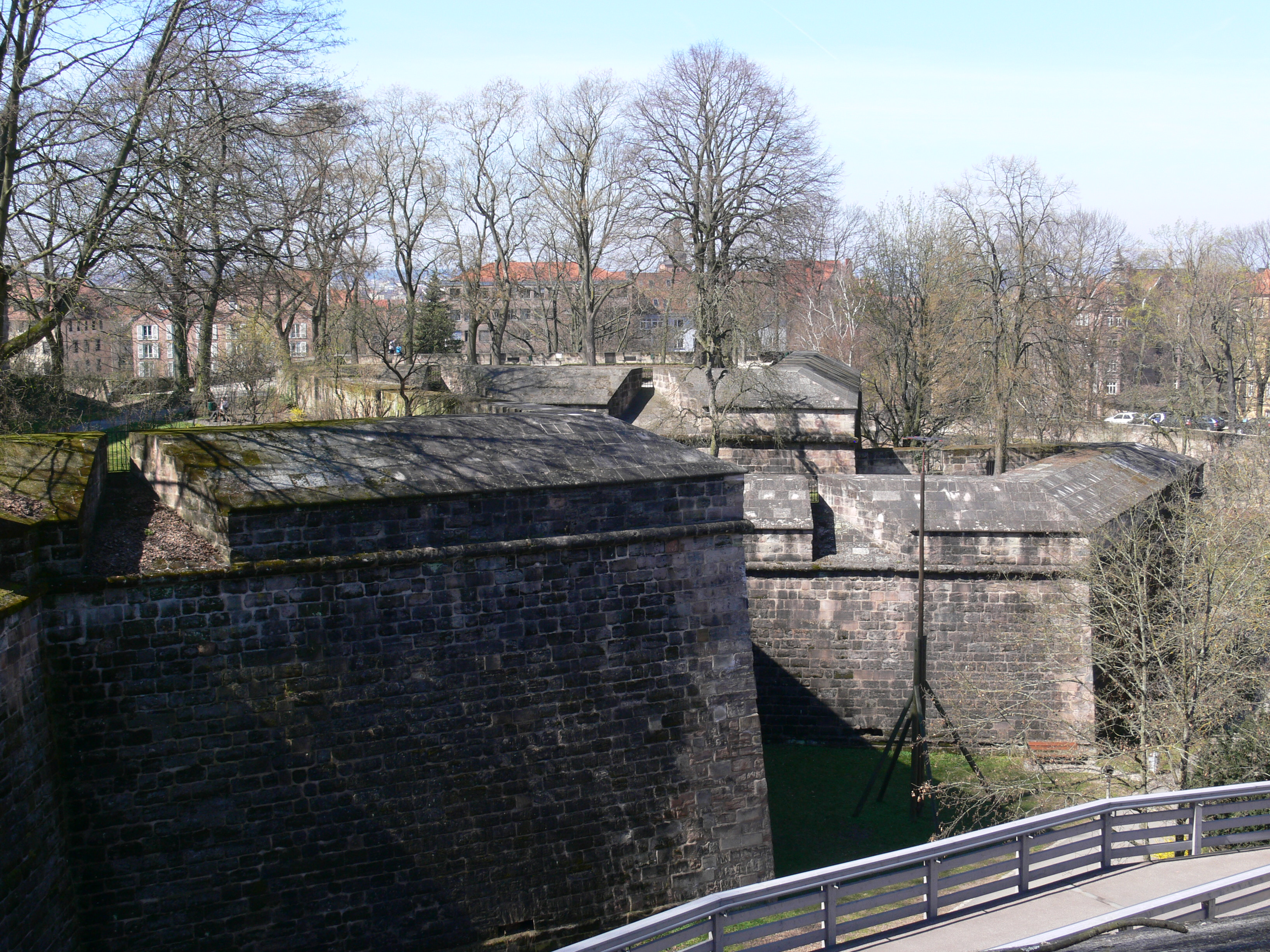 Nürnberg, Burgbasteien